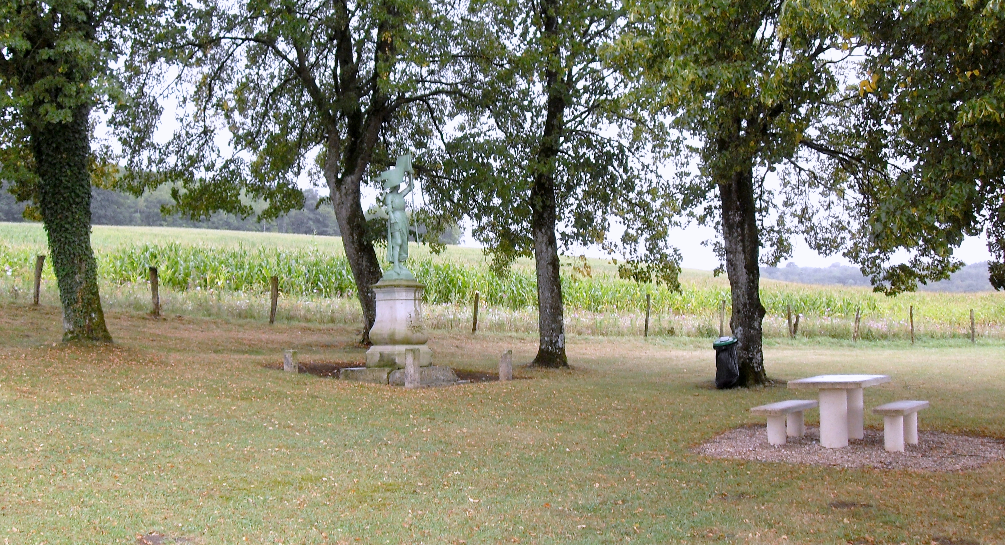 Bovée Monument